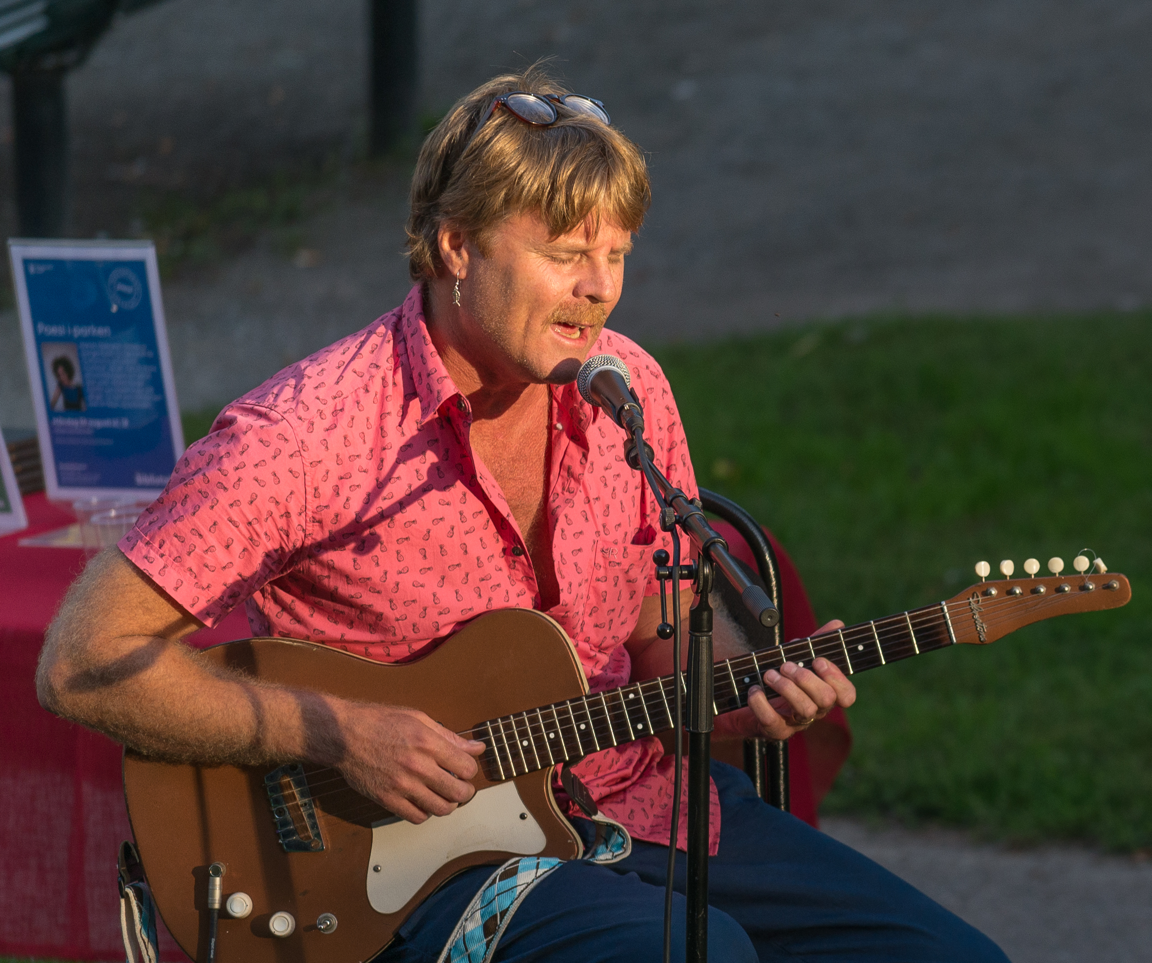 Matilda Södergran, vinnare av Sveriges Radios Lyrikpris 2019 för Överlevorna, och Naima Chahboun, aktuell med sin andra diktsamling Äpplen och päron, läser poesi. Nicolai Dunger framför nya tonsättningar och sånger.